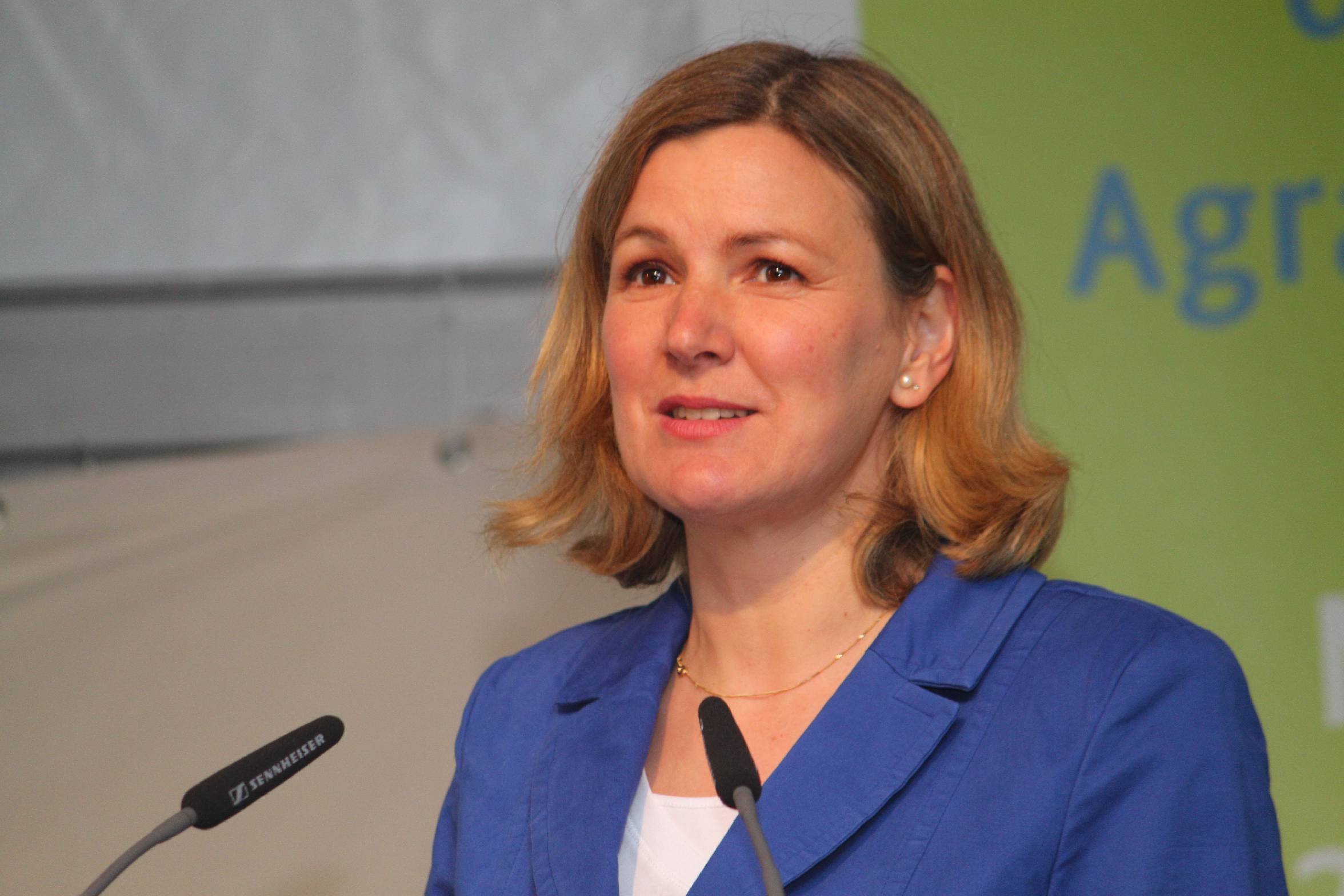 Eröffnung des Agrariums